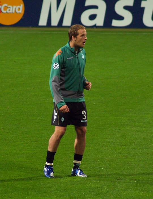 Petri Pasanen (Werder Bremen) im Spiel gegen Levski Sofia